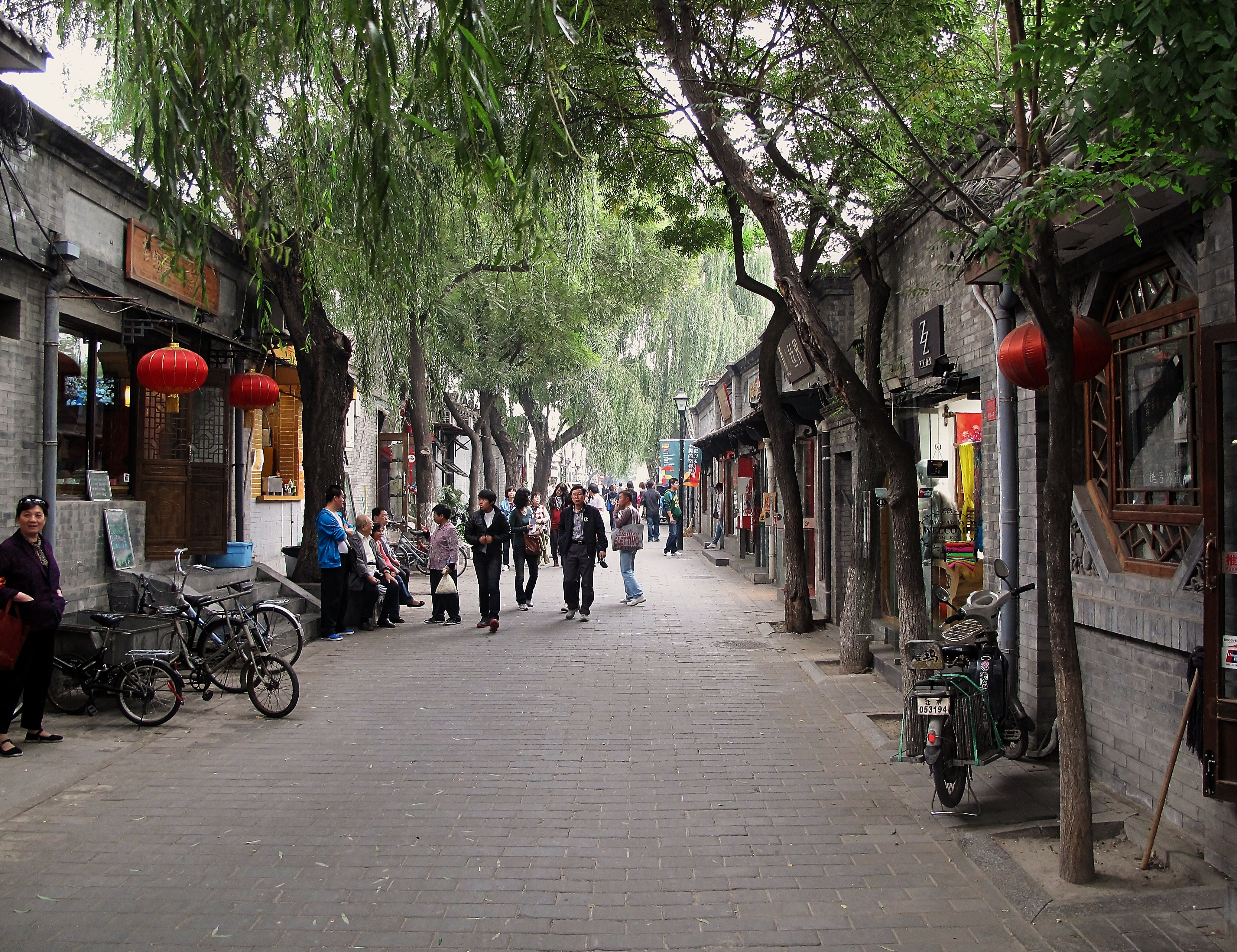 Nanluogu Xiang